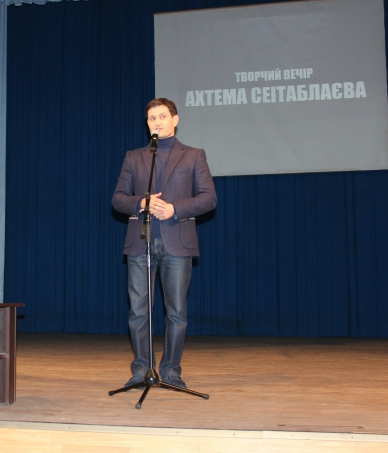 В Мелитополе